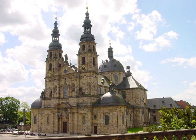 Aufnahme des Fuldaer Dom (selbstfotografiert 2003, Public Domain)